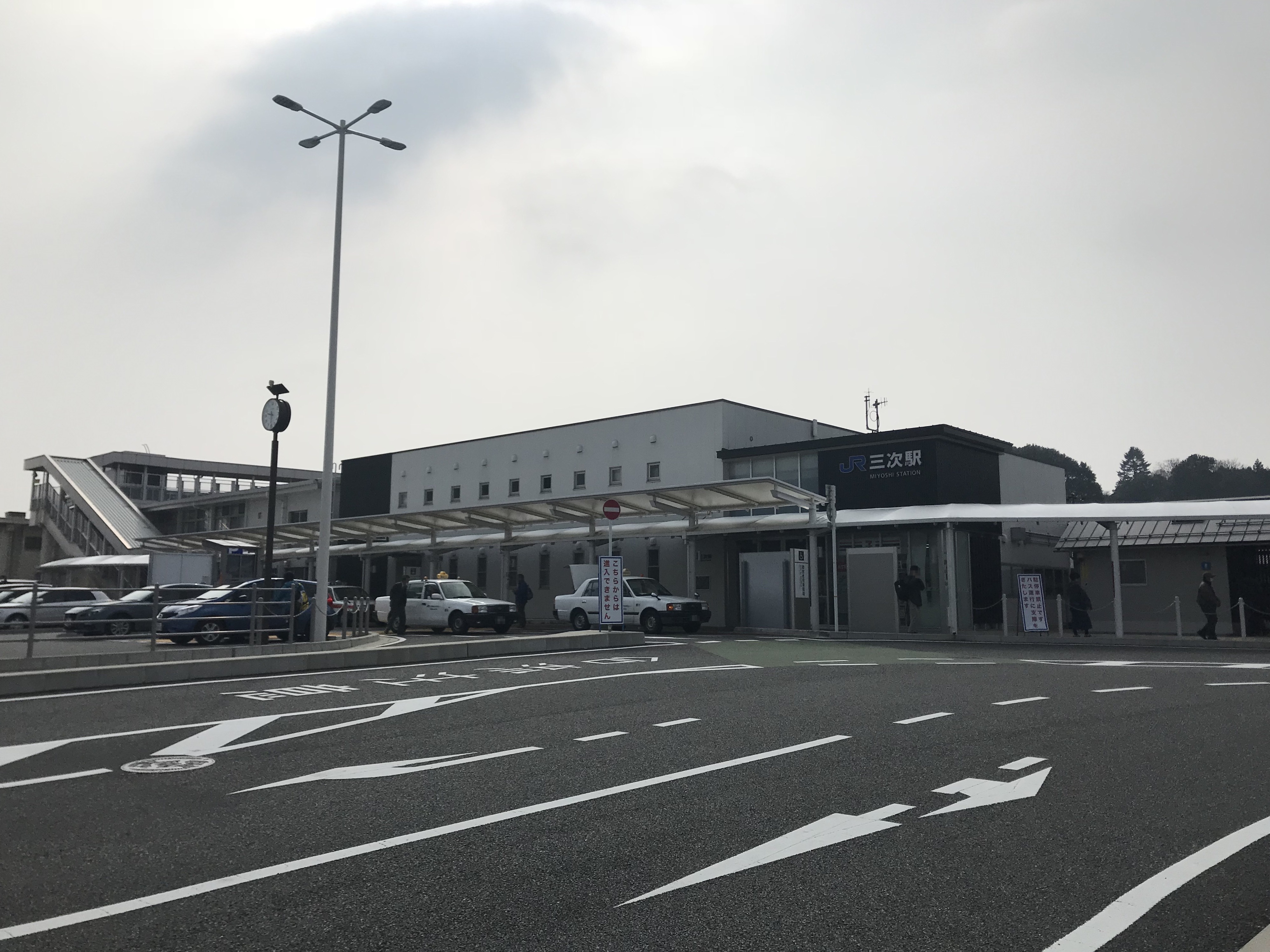 三次駅駅舎